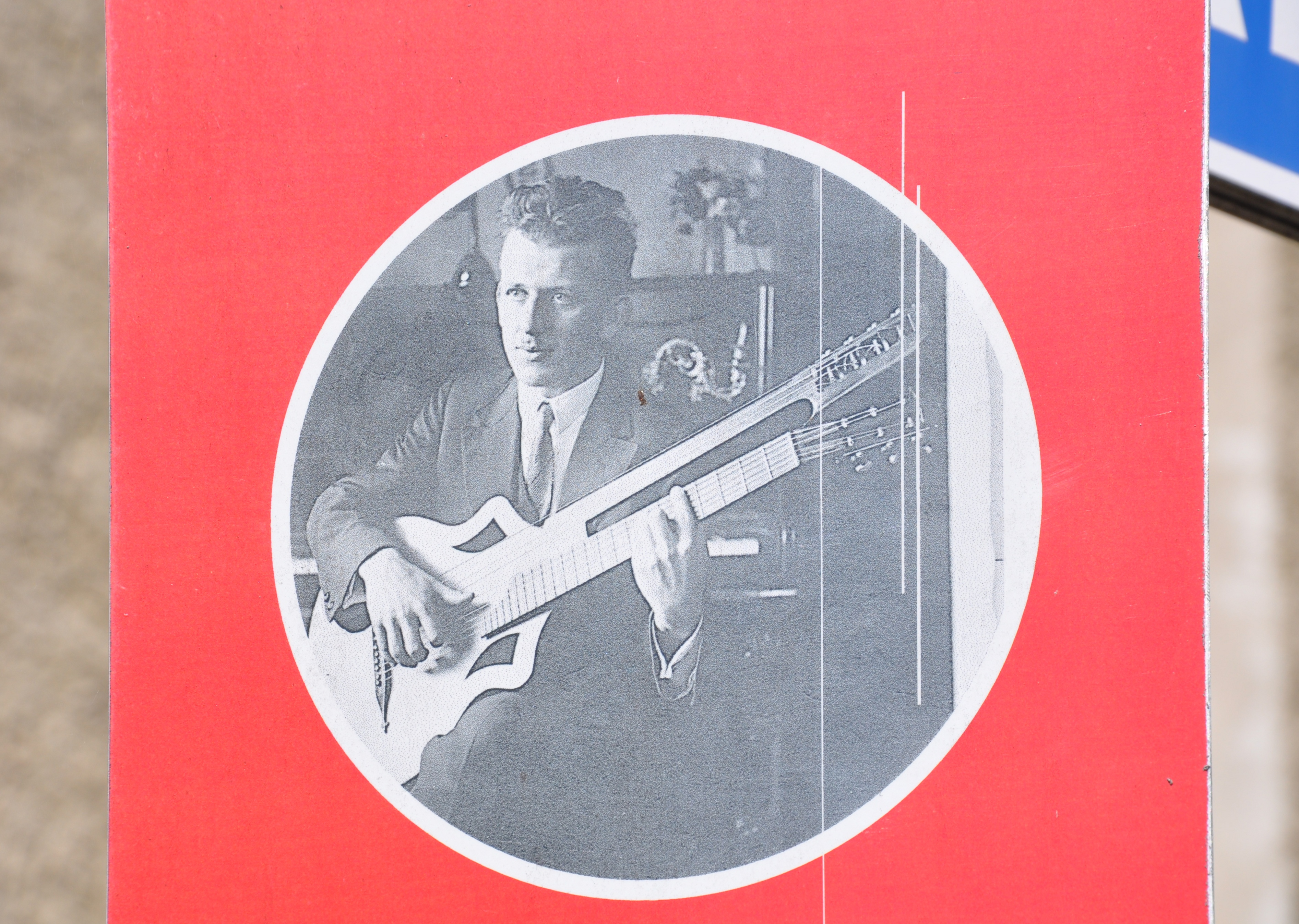 Bregenz, Ernst-Volkmann-Stiege bei der Pfarrkirche St. Gallus, Informationstafel, Detail: Portrait Ernst Volkmann mit Gitarre